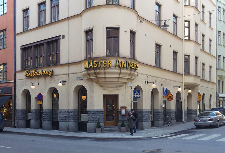 Restaurangen Mäster Anders i korsningen Hantverkargatan/Pipersgatan.